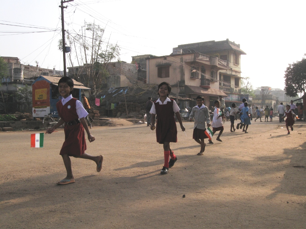 ஆகஸ்ட் 15 அன்று சுதந்திர தினவிழாவில் மகிழ்ச்சியோடு கலந்து கொள்ளும் ஆவலில் தாவிச் செல்லும் மழலைகள்.